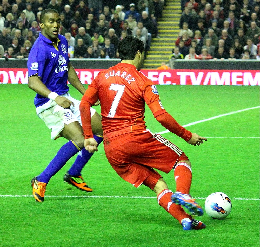 Luis Suarez runs at Distin during Merseyside Derby in 2012.